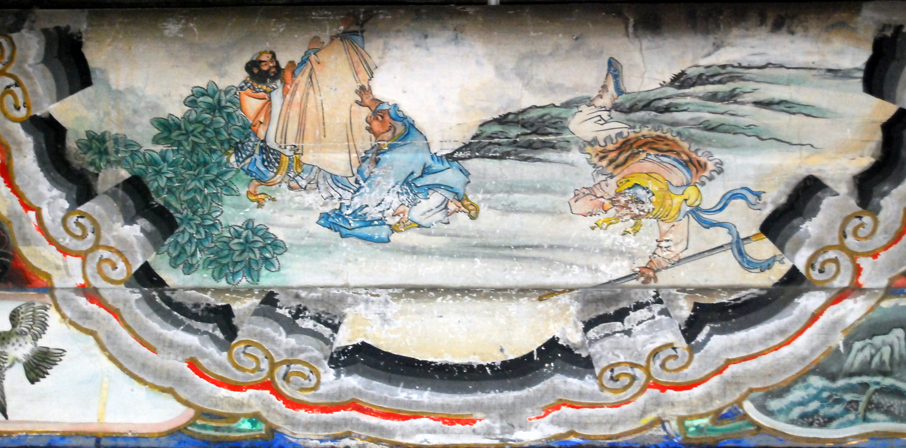 颐和园长廊彩绘中的唐僧师徒四人，应为三打白骨精故事中，唐僧念紧箍咒要赶走孙悟空的情节